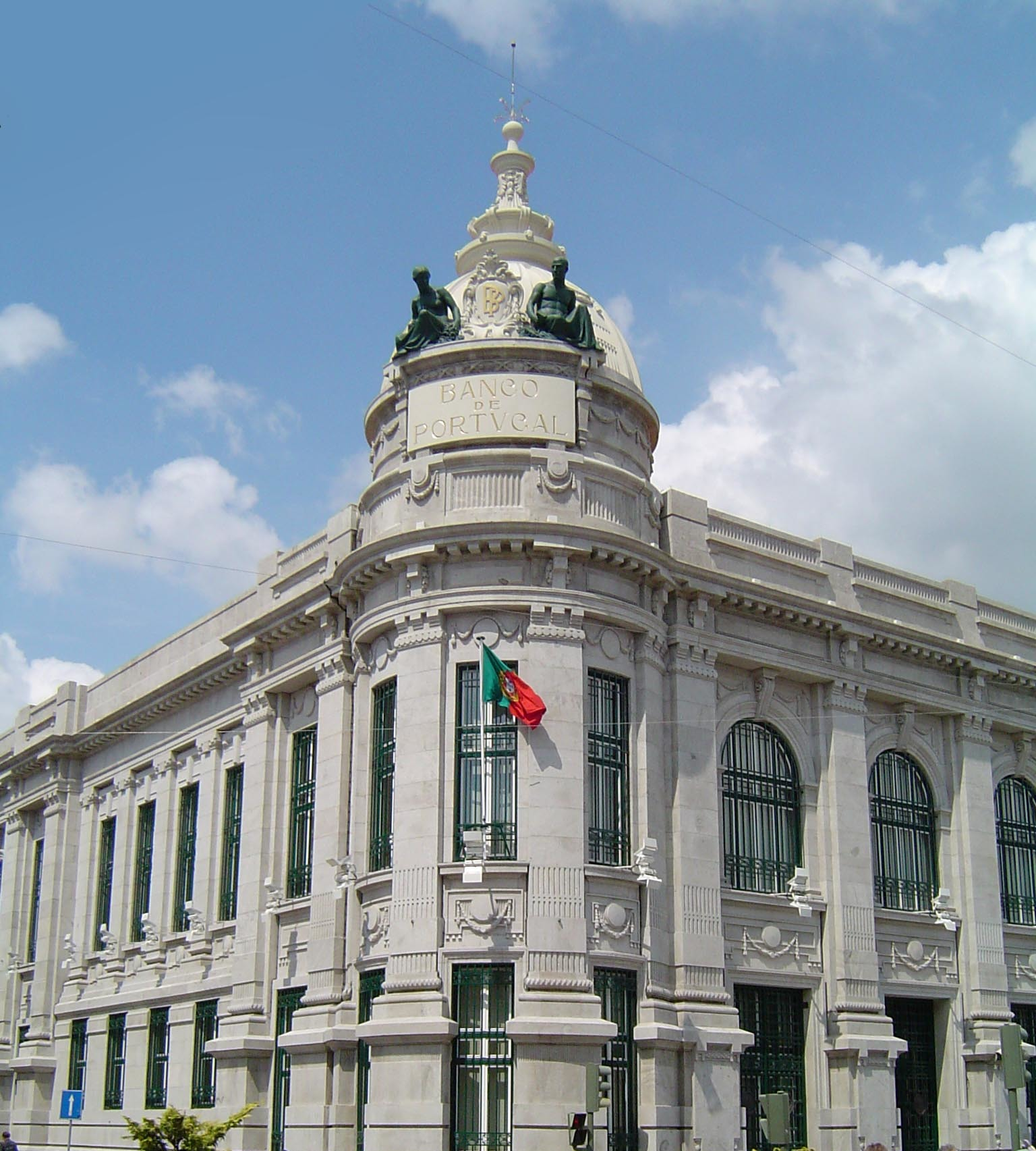 Edificio do Banco de Portugal em Braga.